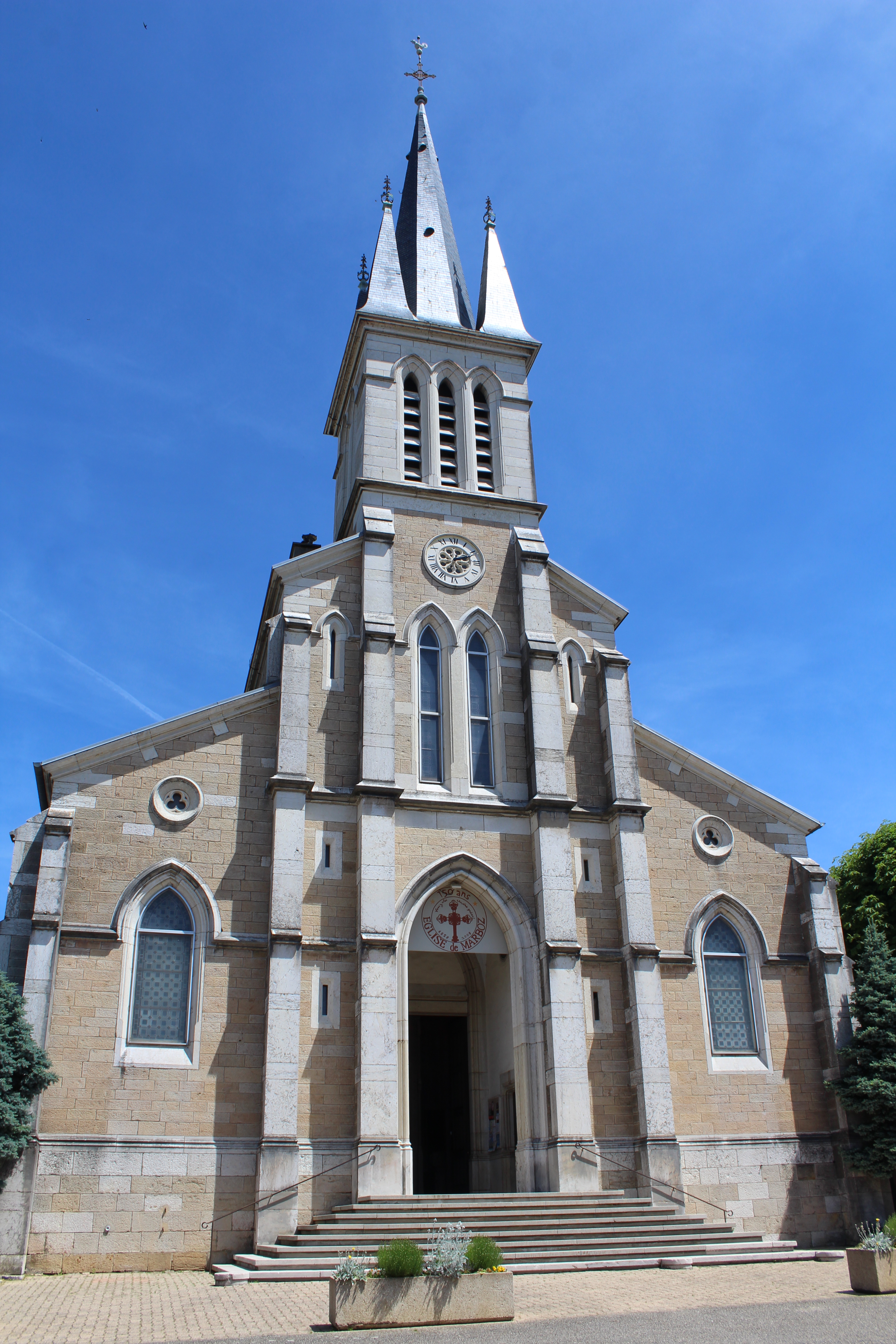 Église Saint-Martin de Marboz.